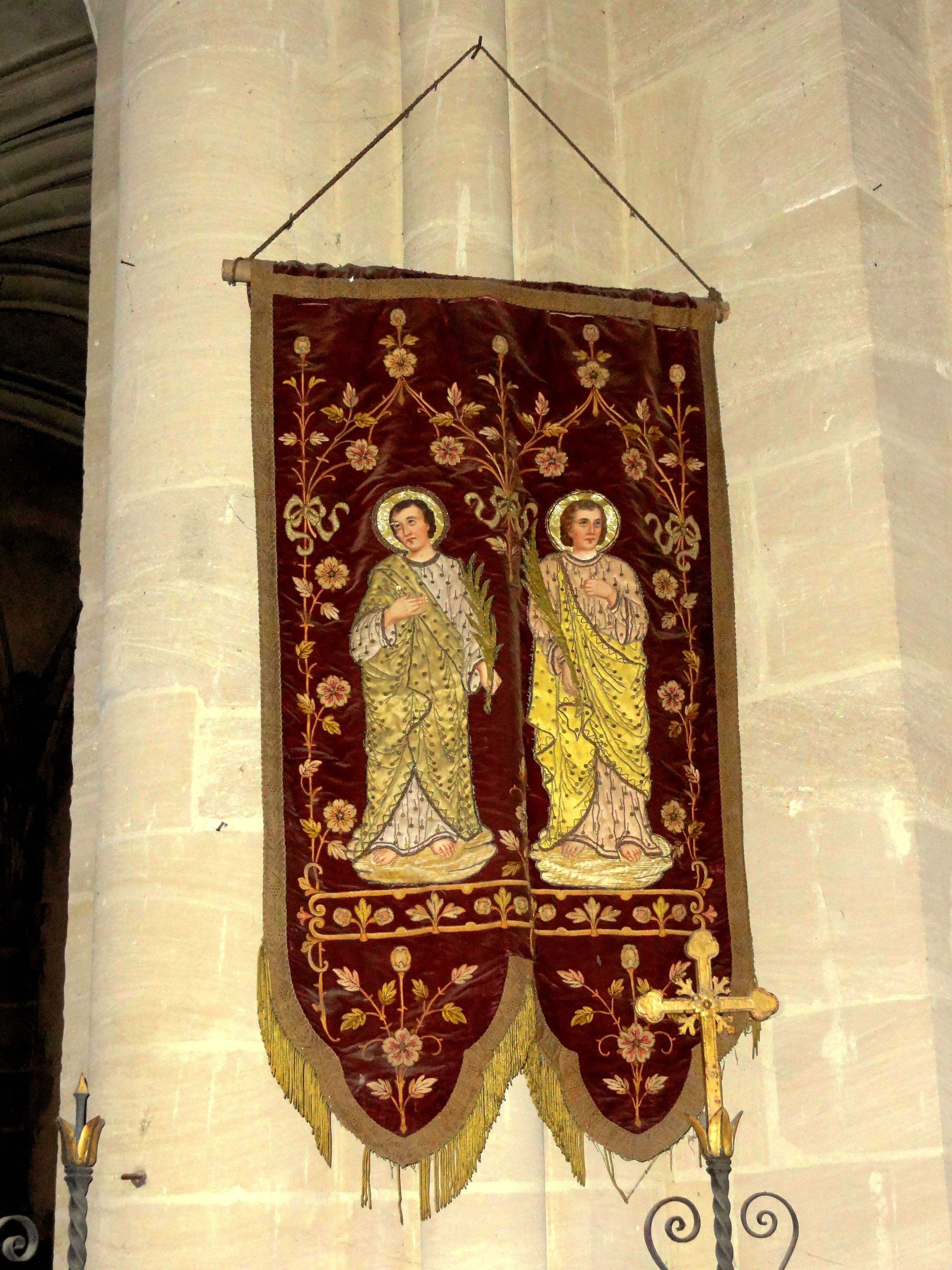 Mobilier de l'église (voir titre).